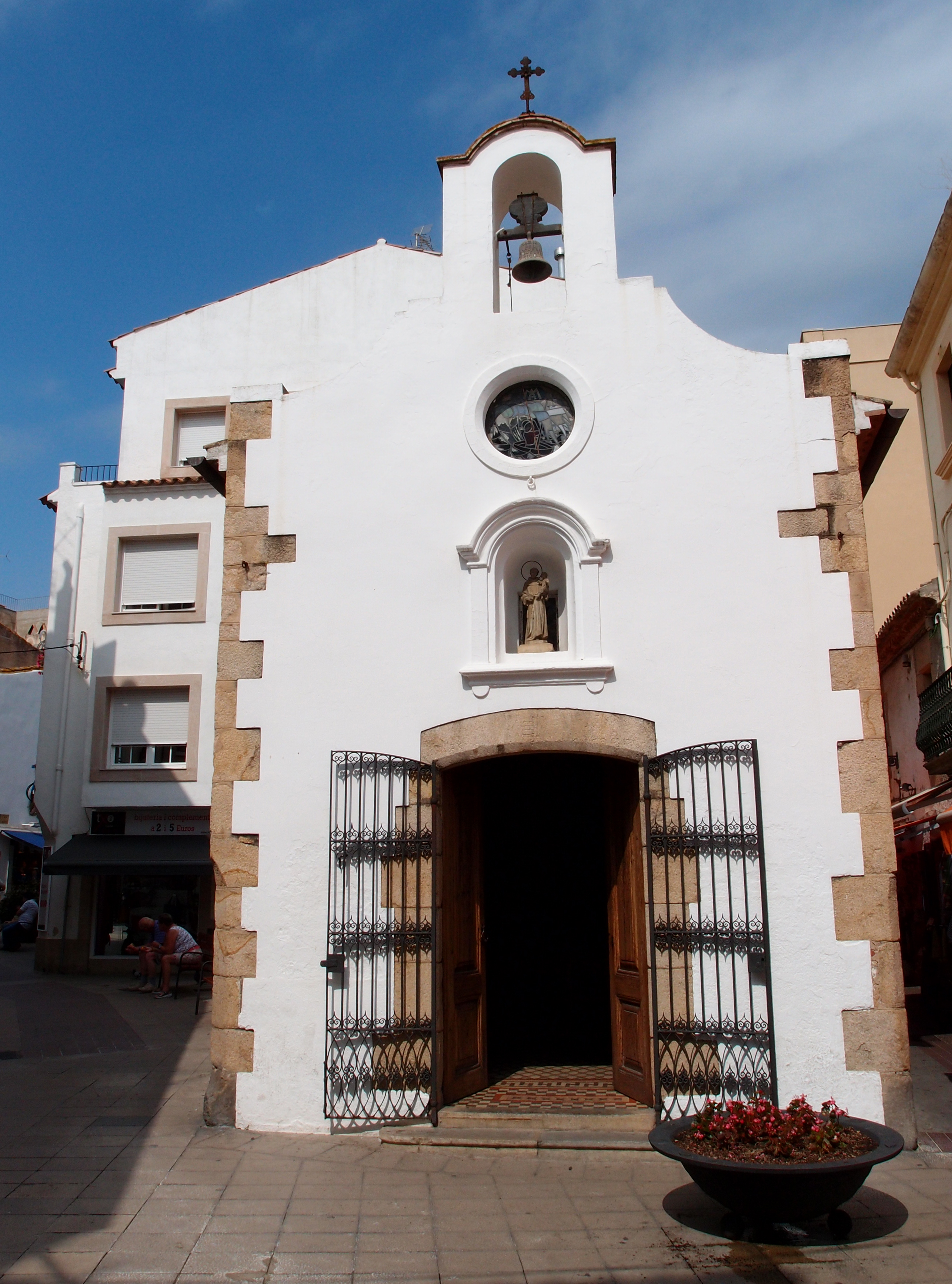 Capella de la Mare de Déu del Socors - (Tossa de Mar/Katalonien/Spanien) Datum: 19.09.2012 Urheber: M. Pfeiffer alias Benutzer:Gordito1869 Quelle: privates Fotoarchiv des Urhebers